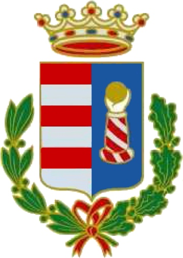 Comune di Cremona stemma